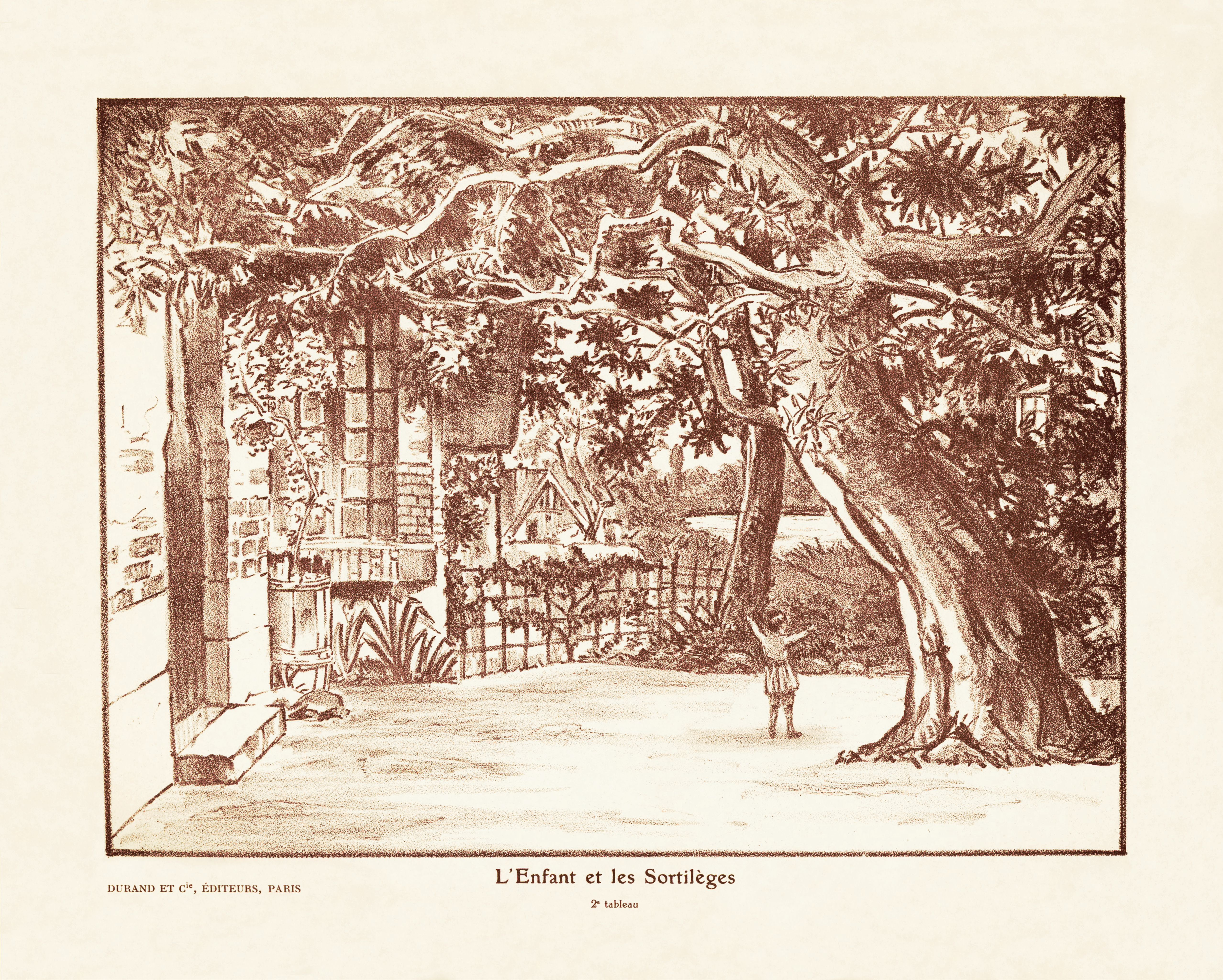 2nd scene of Colette and Maurice Ravel's opera L'enfant et les sortilèges, as performed at the Paris première at the Théâtre de l'Opéra-Comique on 1 February 1926